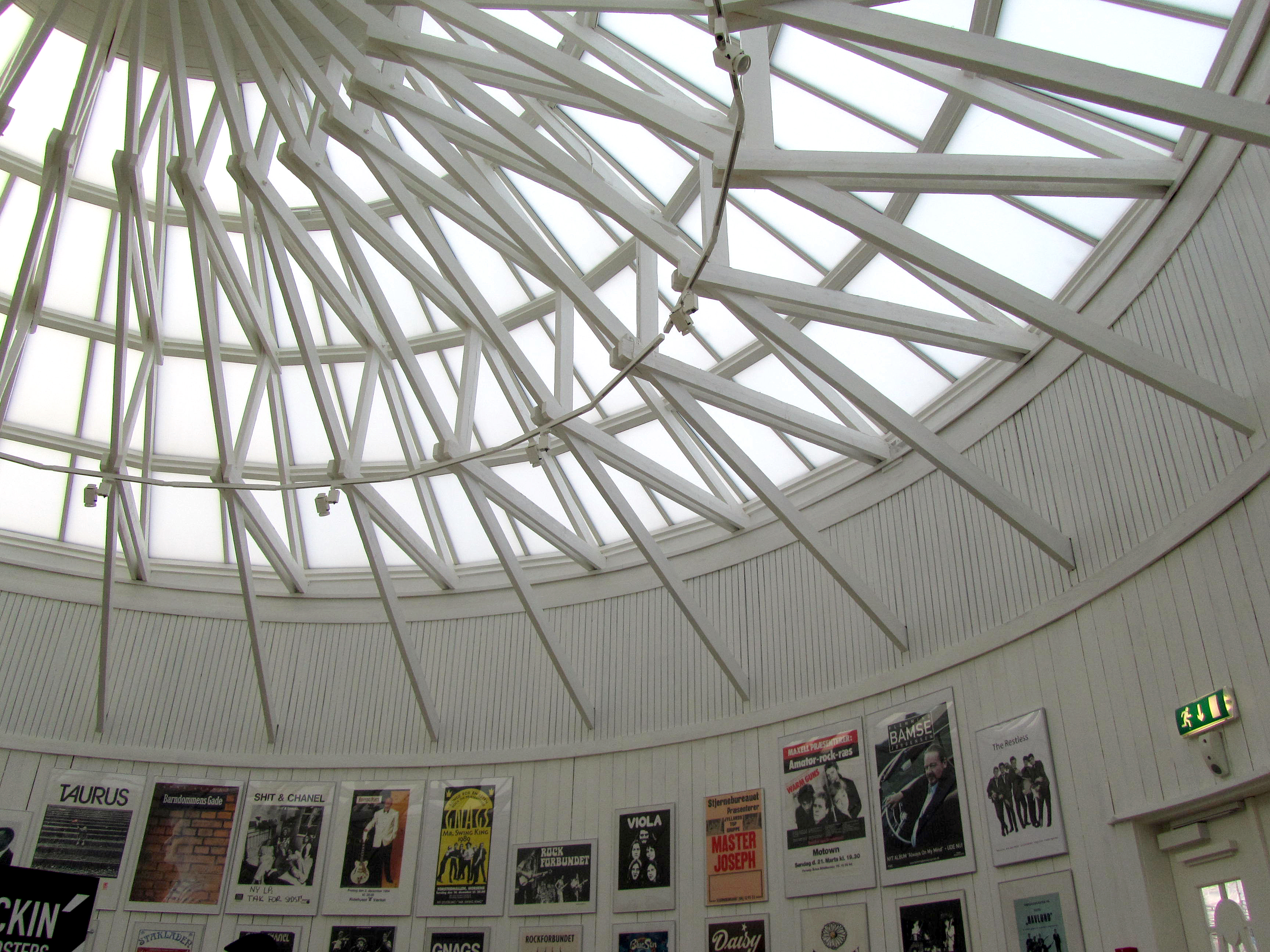 Loftskonstruktionen i pavillonen.